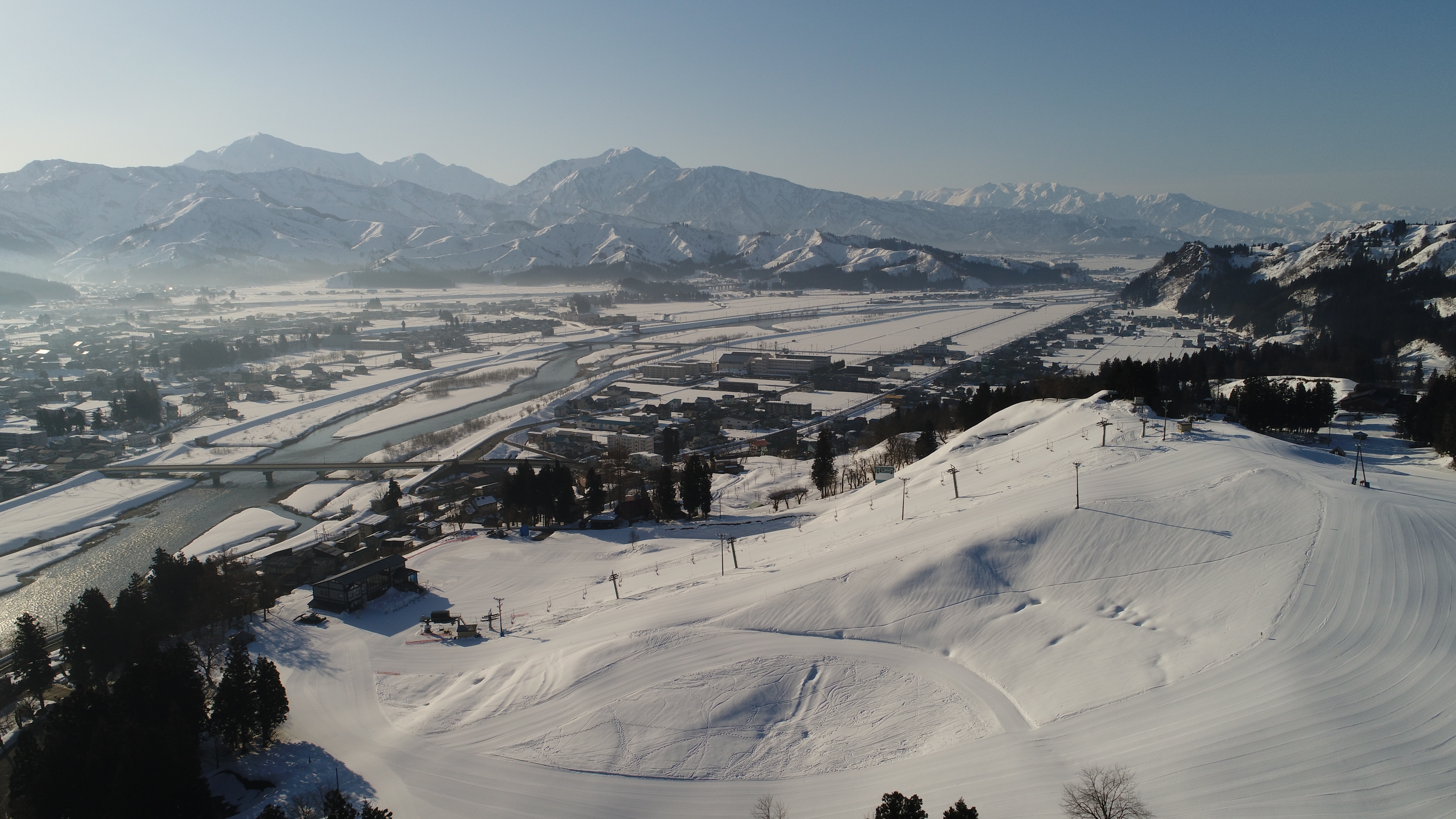 小出スキー場から北西方向 高度150mから撮影した画像